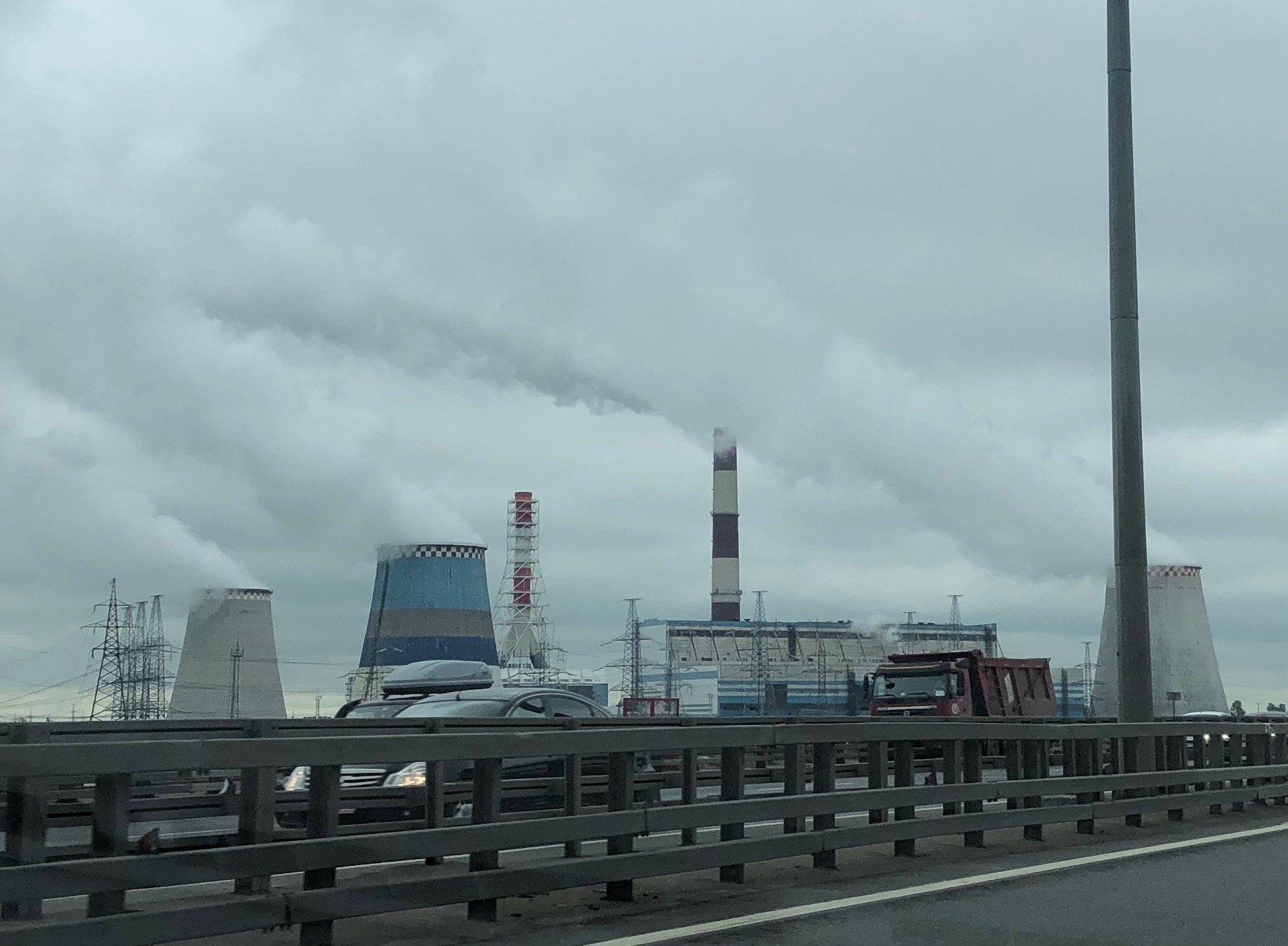 Южная ТЭЦ